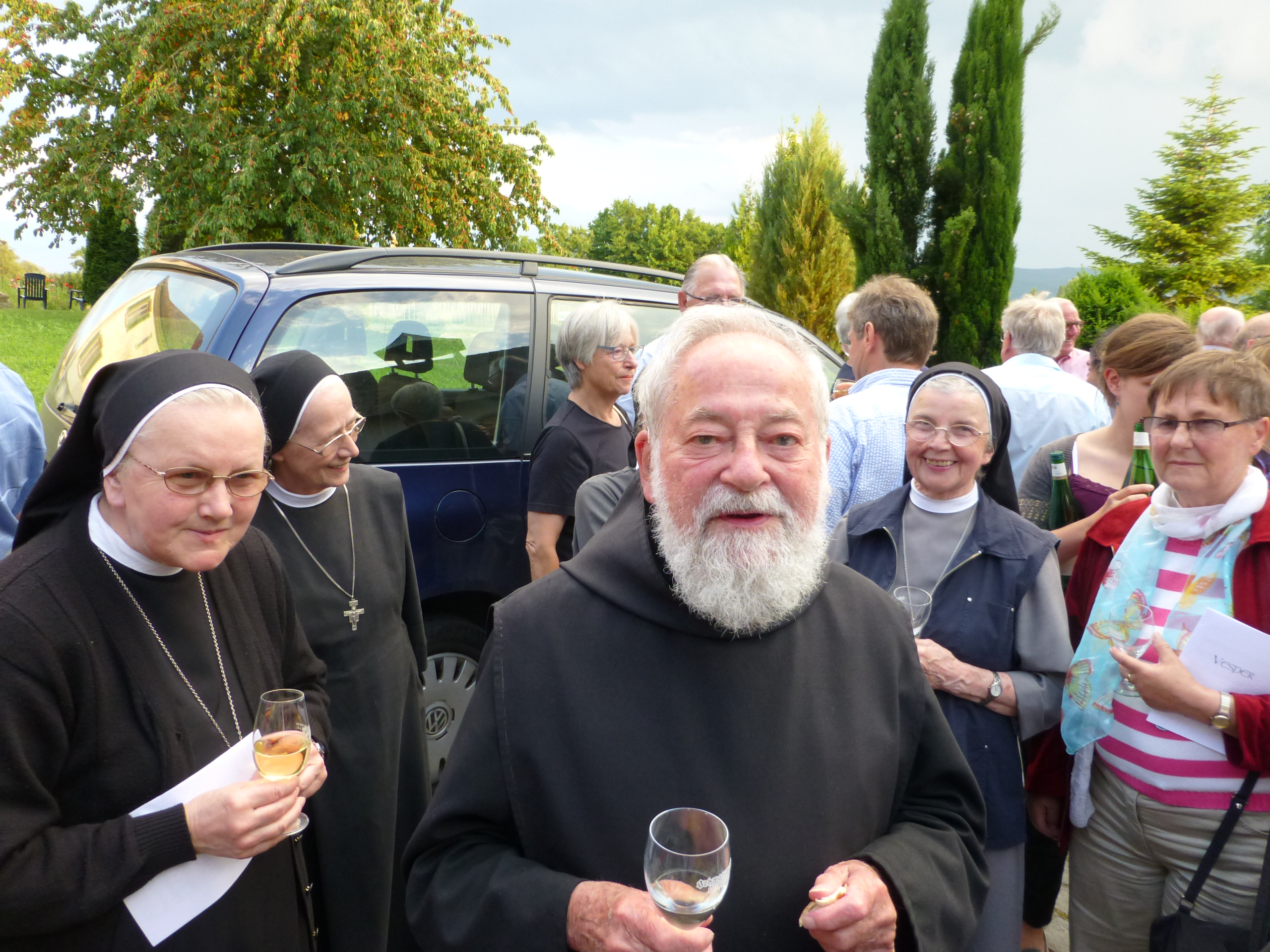 Nikolaus Egender OSB an der Benediktinercella Insel Reichenau (2014)